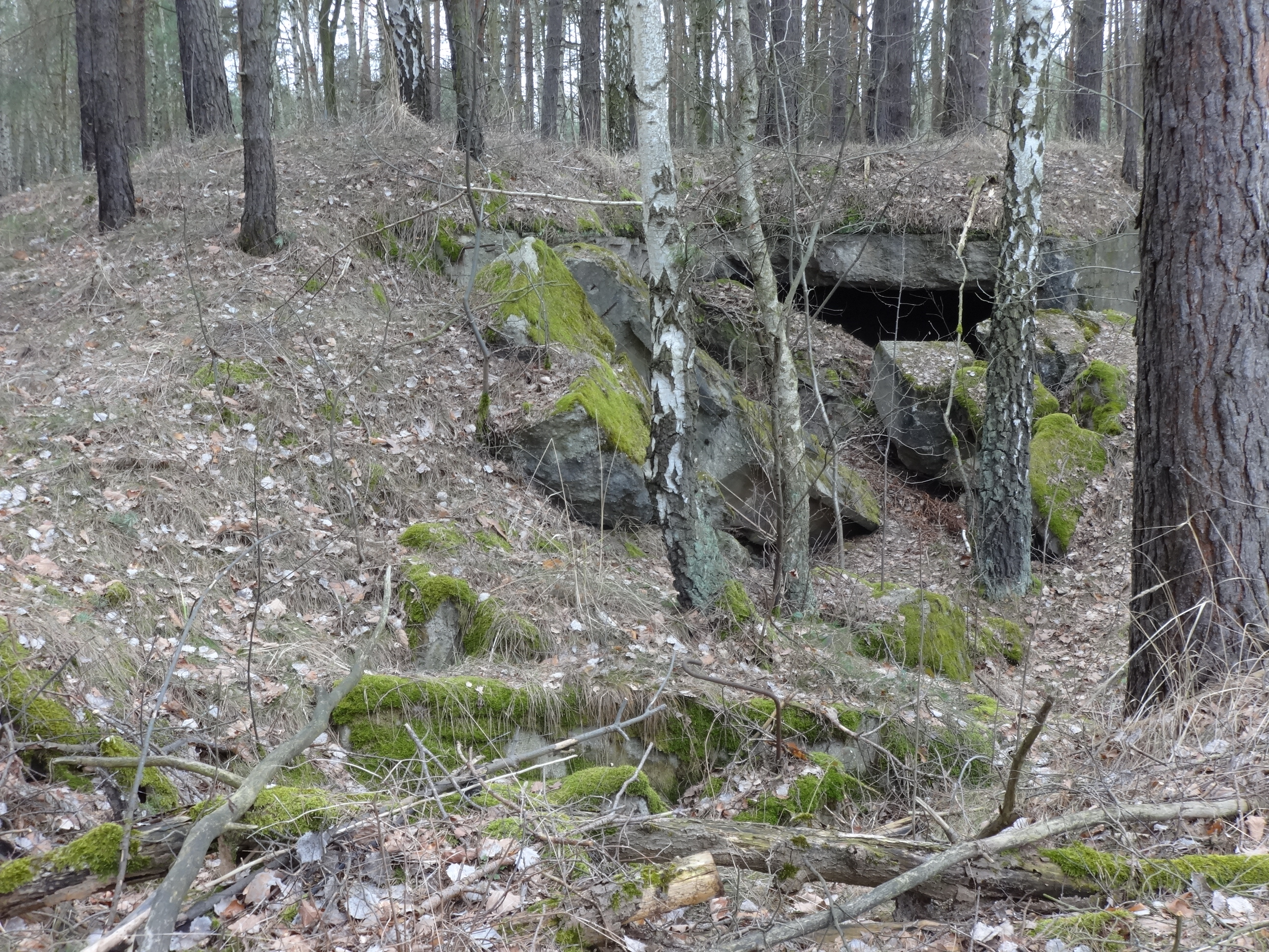 Der Güldensee ist ein rund 24 Hektar großes Gewässer in Groß Köris im Landkreis Dahme-Spreewald in Brandenburg.